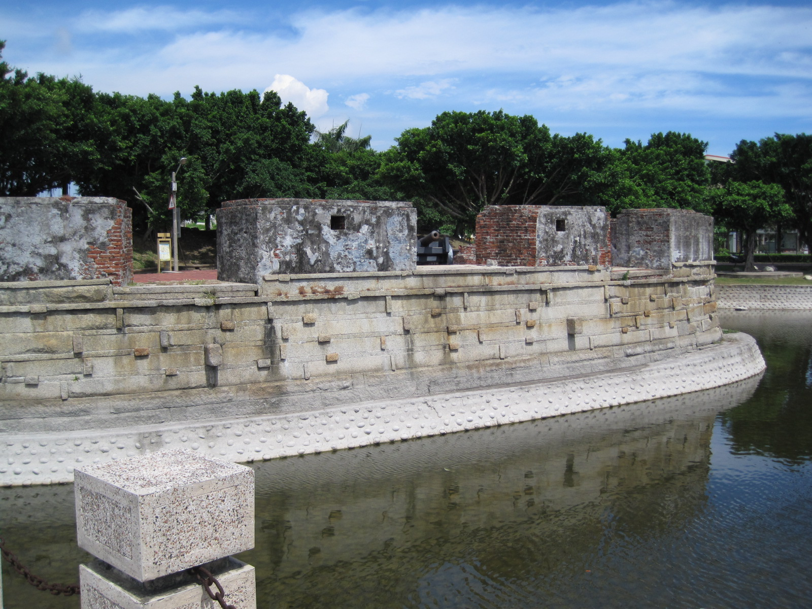 安平小砲臺